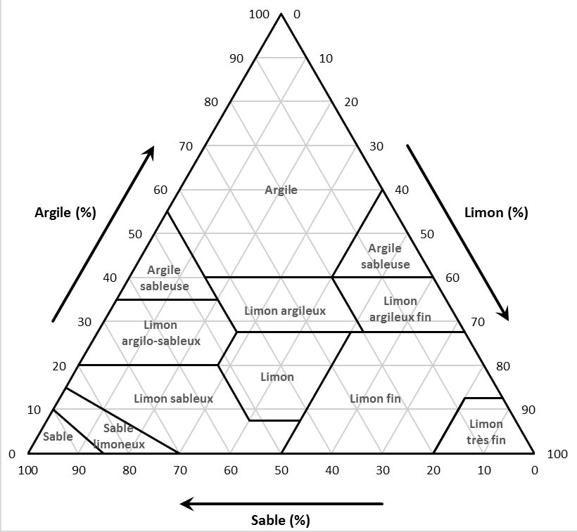 Diagramme triangulaire de la texture des sols; there is an error in this image, the little triangle 'argilo-sableuse' near the limon side should read 'argilo-limoneux'